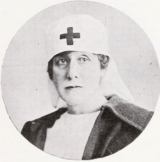 Sofía Eastman Cox -conocida también como Sofía Eastman de Huneeus- fue una escritora feminista y socialité chilena.